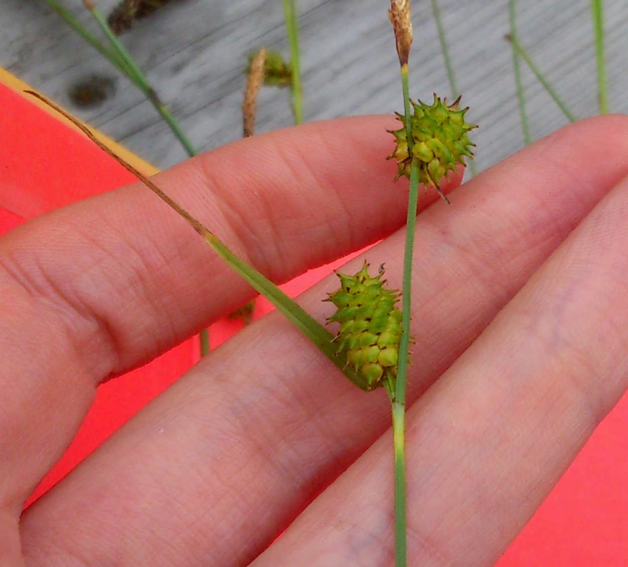 Fotograferad vid Tullgarnsnäset, Södermanlands län